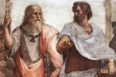 Platone ed Aristotele, dettaglio della "Scuola di Atene" di Raffaello, nelle stanze dei Musei Vaticani.